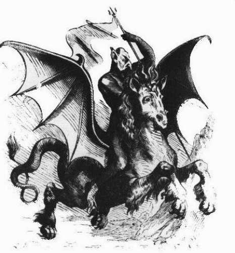 Dämon Abigor, Aus Collin de Plancy's Dictionnaire Infernal, erschienen 1863. (Quelle: :en:Image:Abigor.jpg)